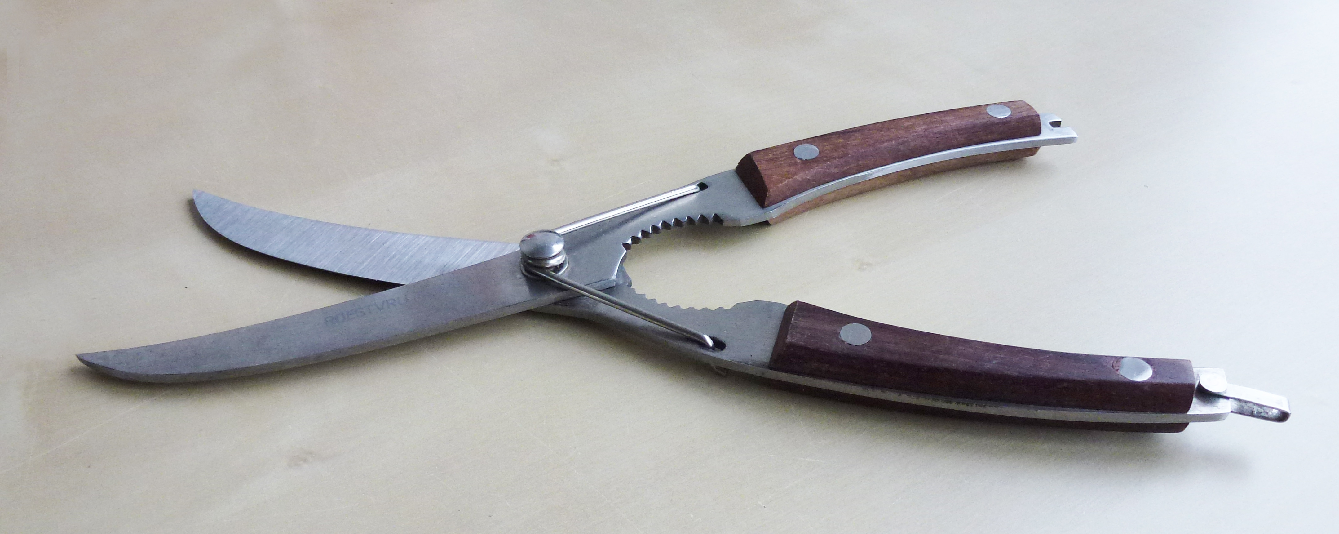 Wildschaar met houten handvatten